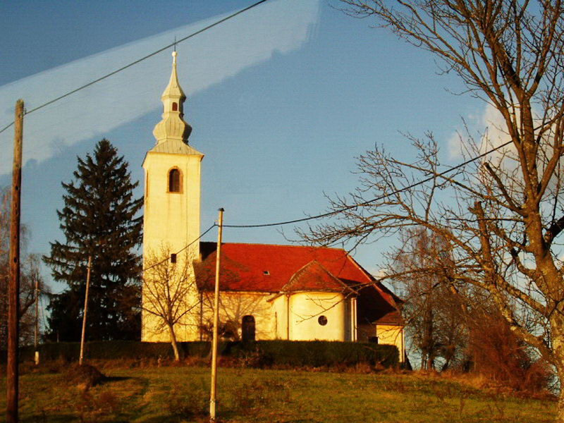 Preseka - Church